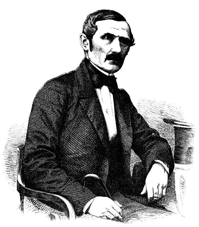 Johan August Gripenstedt